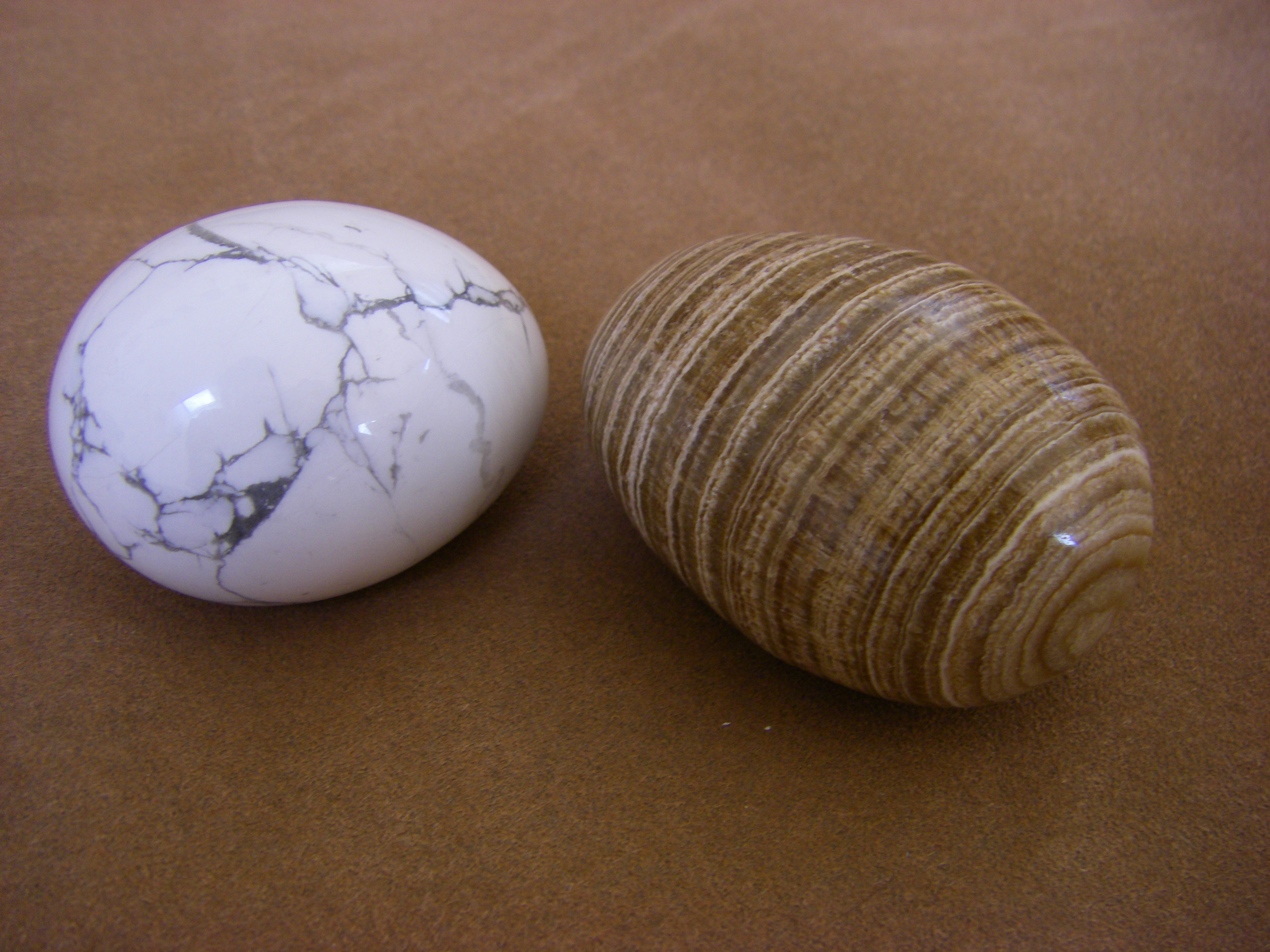 Zwei Stopfeier aus Stein